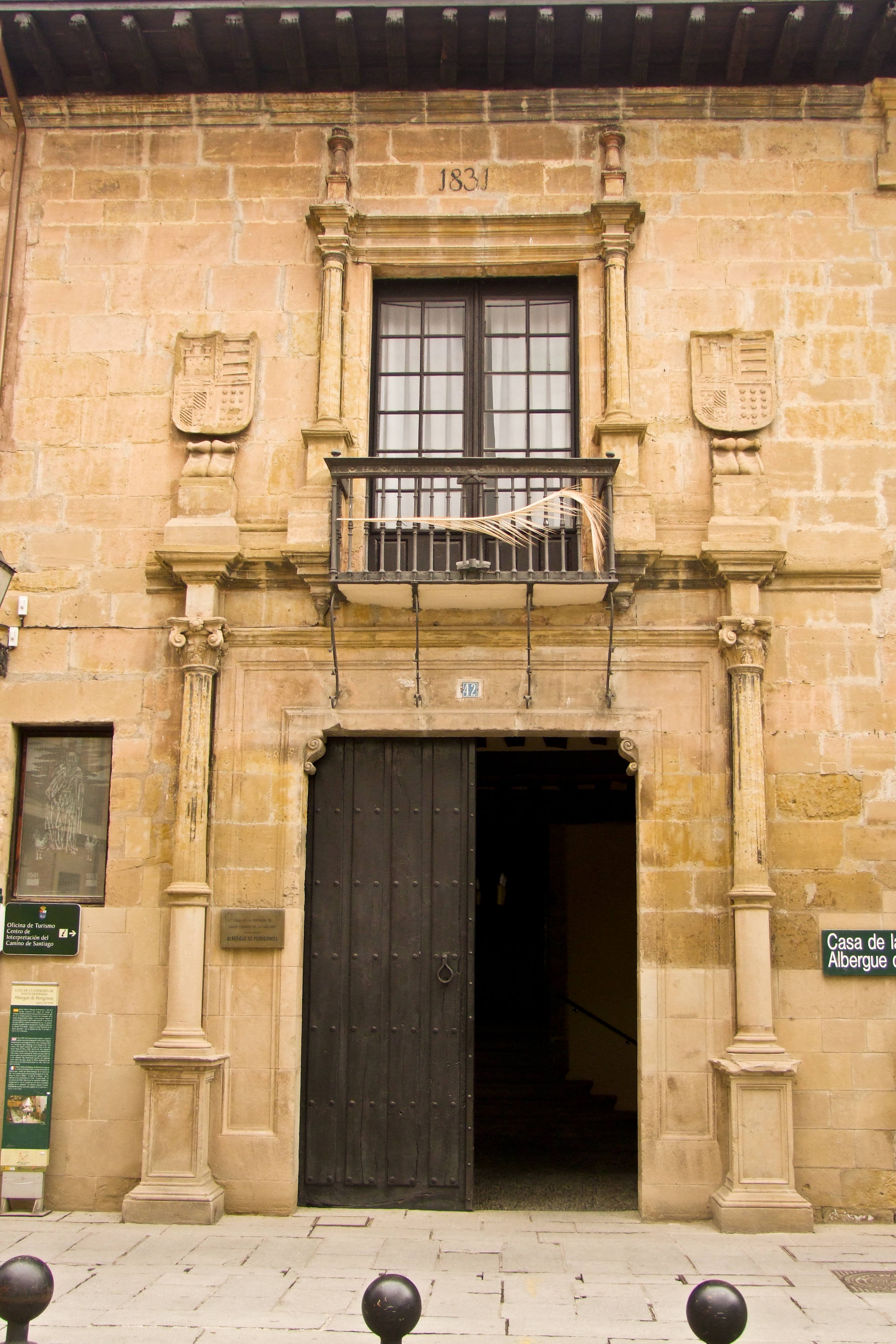 Casa de la Cofradia del Santo en la localidad de Santo Domingo de la Calzada, La Rioja - España